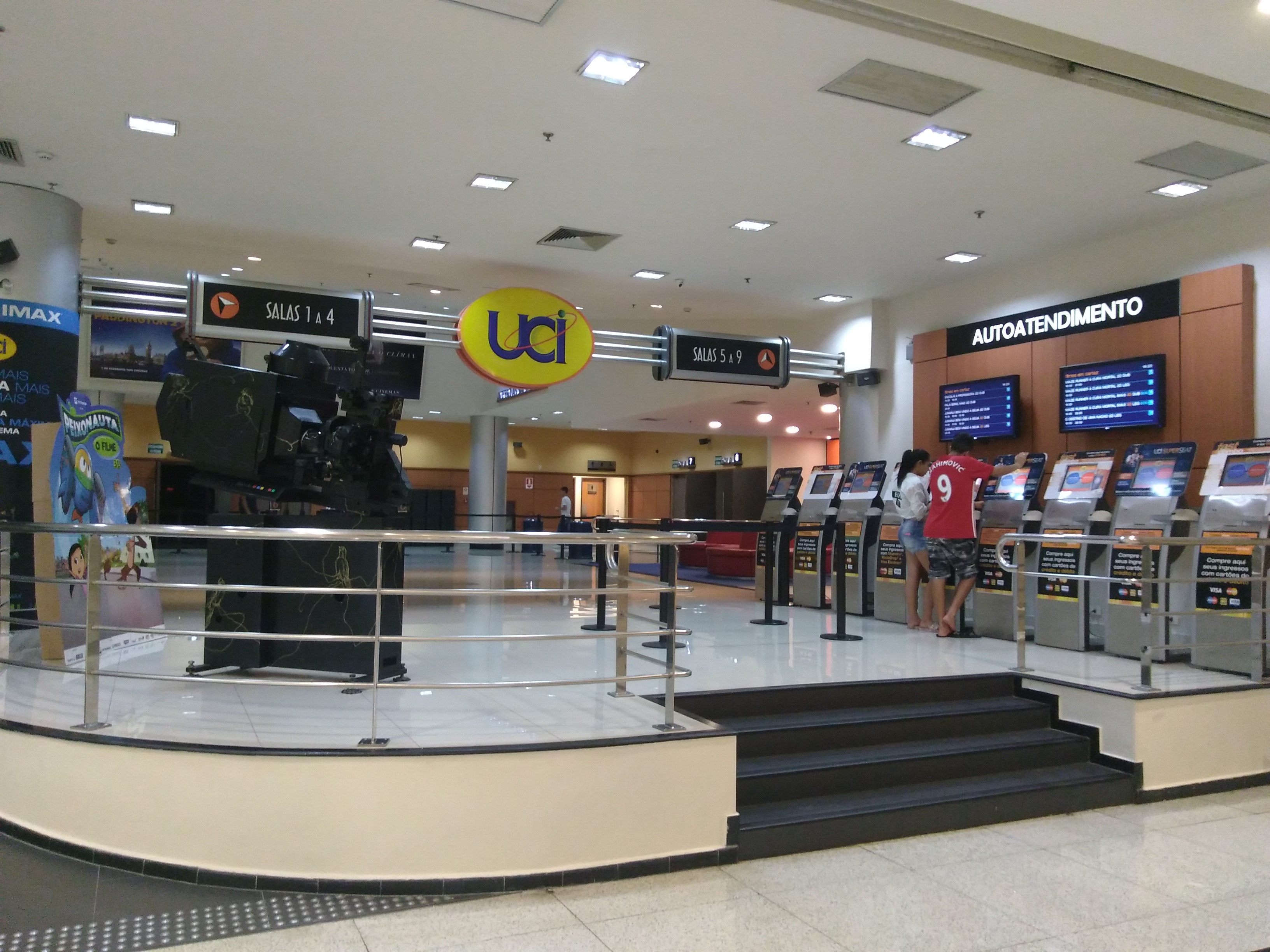 Vista exterior do UCI Anália Franco, de São Paulo, SP